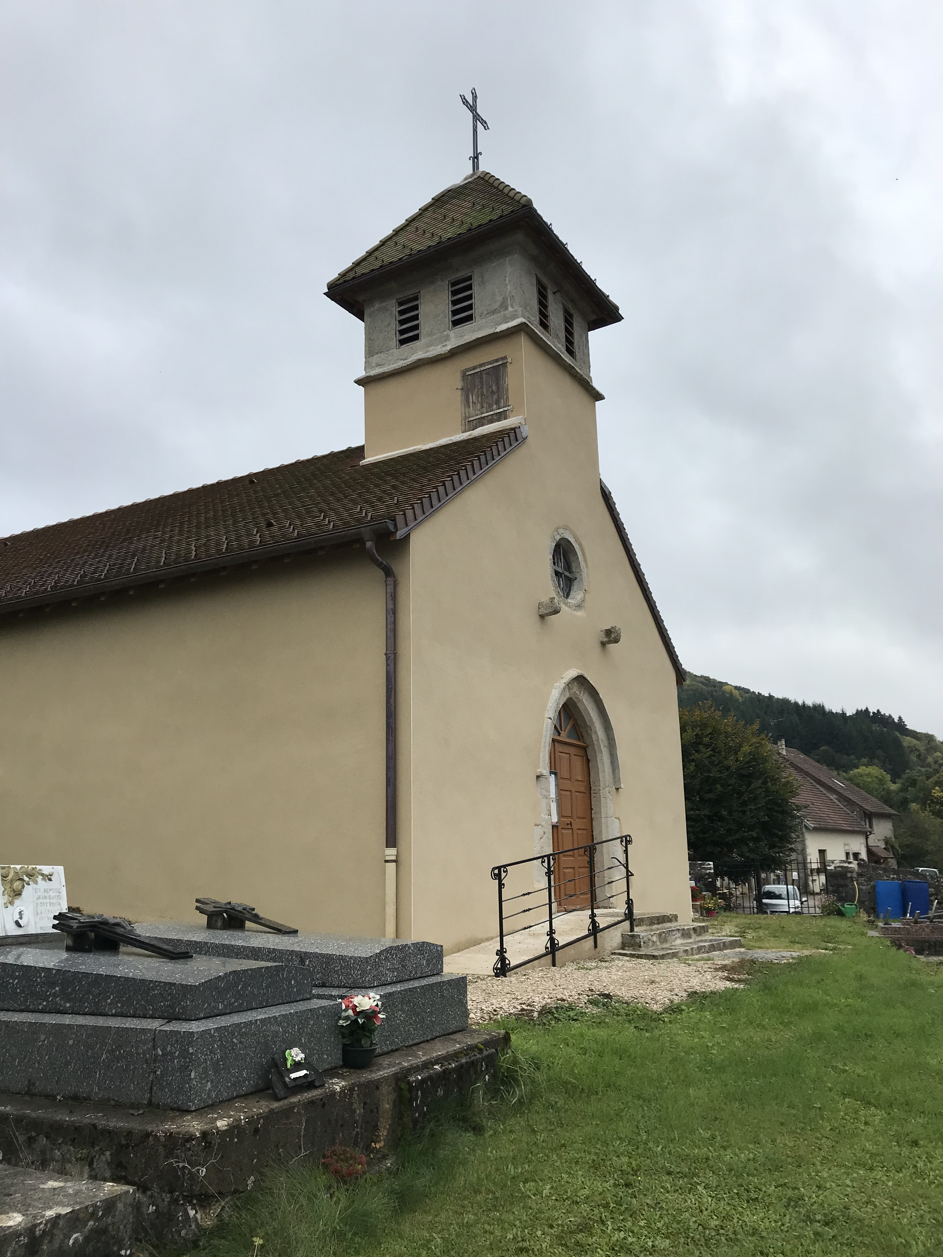 Marnézia (Jura, France) en octobre 2017.